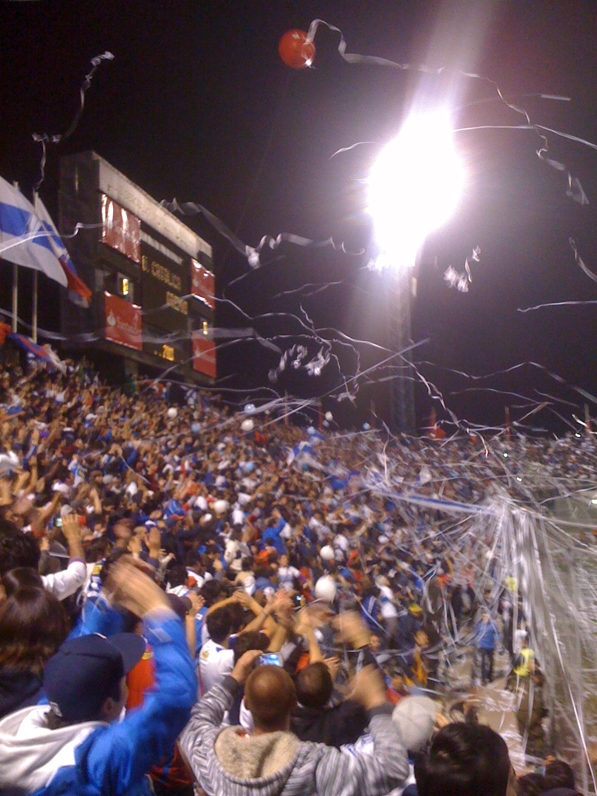 Salida de la UC frente a Gremio, Copa Libertadora 2011